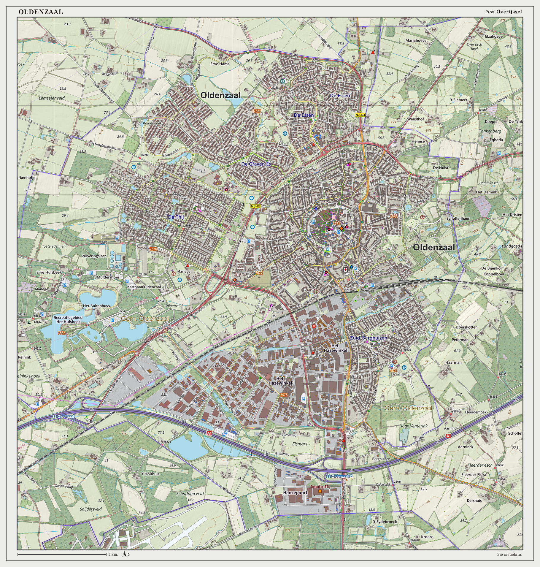 Topografische kaart van Oldenzaal (woonplaats). Resolutie: 300 pixels/km. Kaartbeeld samengesteld uit de open geodata van de Top10NL en Top25namen (Basisregistratie Topografie, Kadaster), Creative Commons BY licentie. Gebouwvlakken uit open geodata BAG extract. Wegen uit de OpenStreetMap. Reliëfschaduw uit de Actuele Hoogtekaart AHN2. Samenstelling en kleurenschema: Jan-Willem van Aalst, met QGIS2. Zie ook de Legenda.